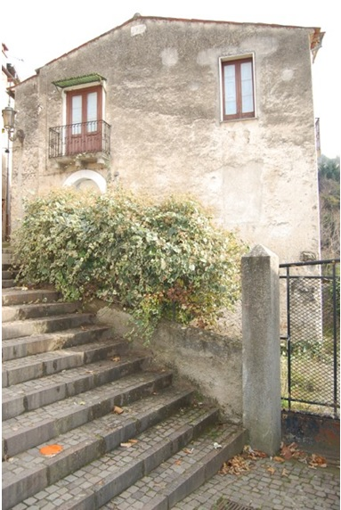 Dal fondo Stato Civile (Comune di Spezzano Piccolo) dell'Archivio di Stato di Cosenza risulta che Pietro Monaco nacque in questa casa tuttora in via Viale.